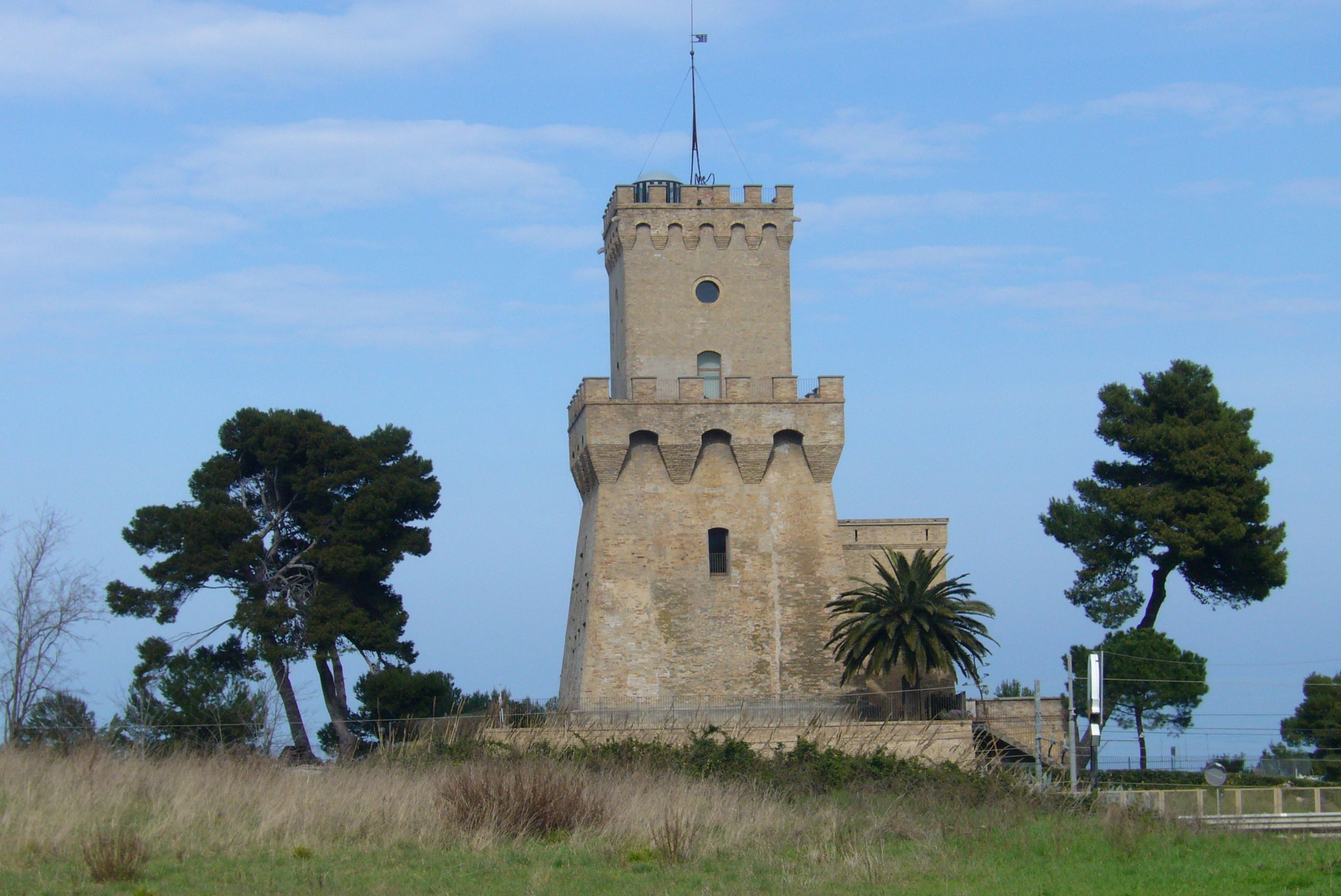 Torre Cerrano